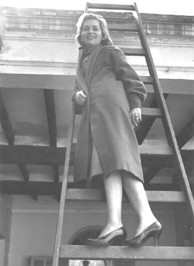 Lotte en el Centro de Estudios Brasileños en 1956. Fotografía del álbum personal de la artista digitalizada por mí.